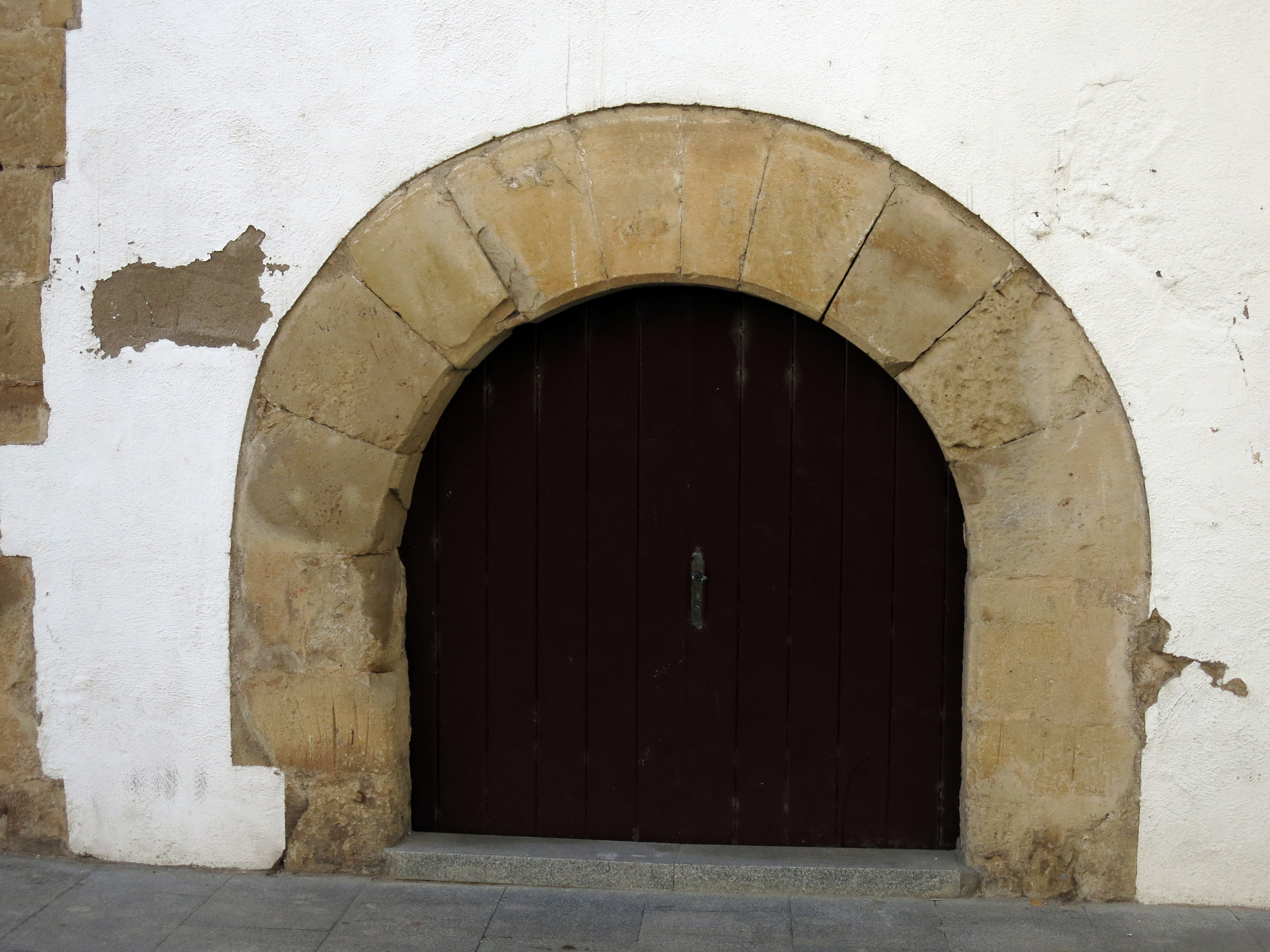 Antiga sinagoga jueva (Tortosa)